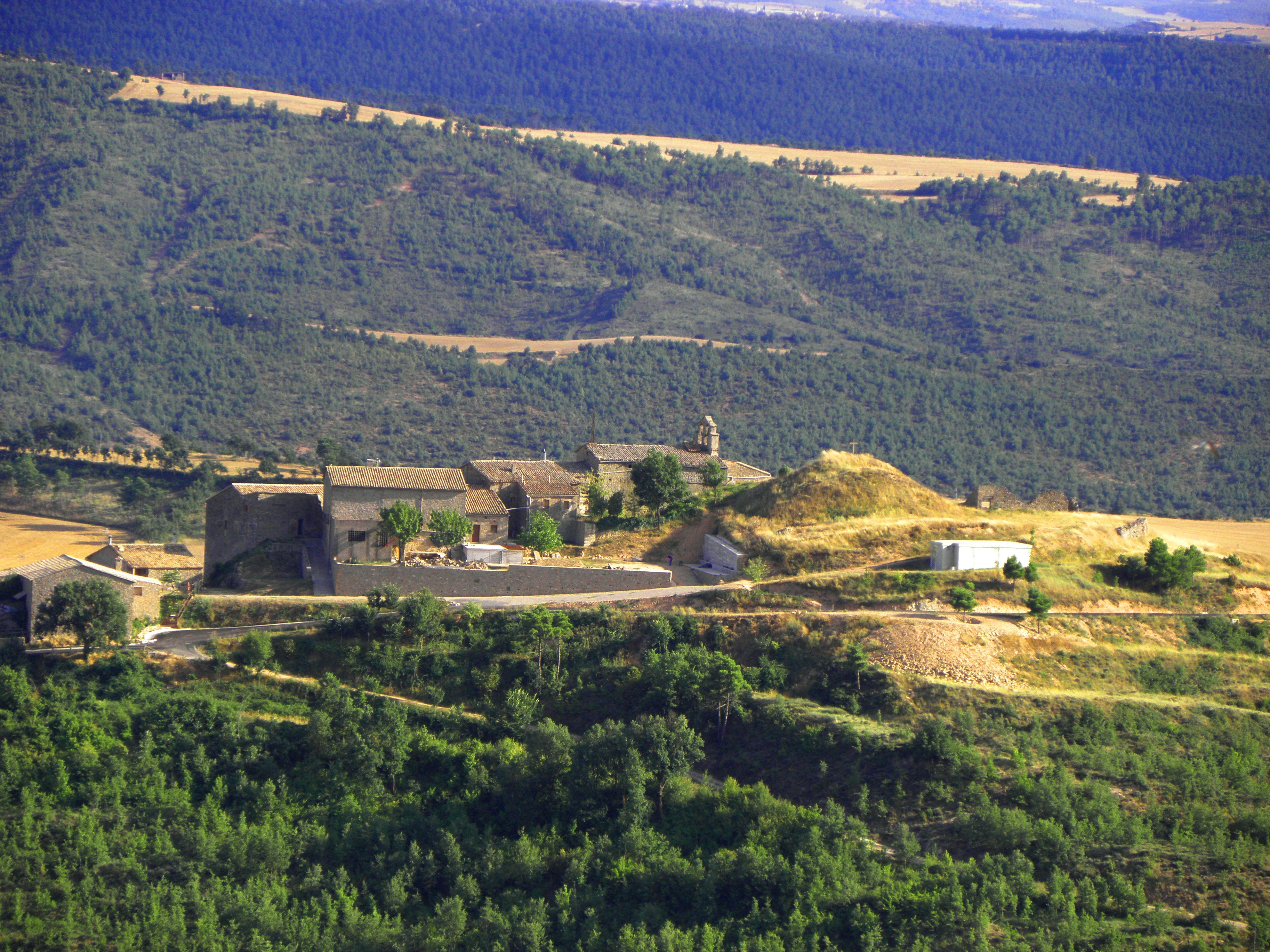 La cara nord del nucli de Pinós, al municipi del mateix nom, al Solsonès vist des de la baixada del Santuari de Pinós